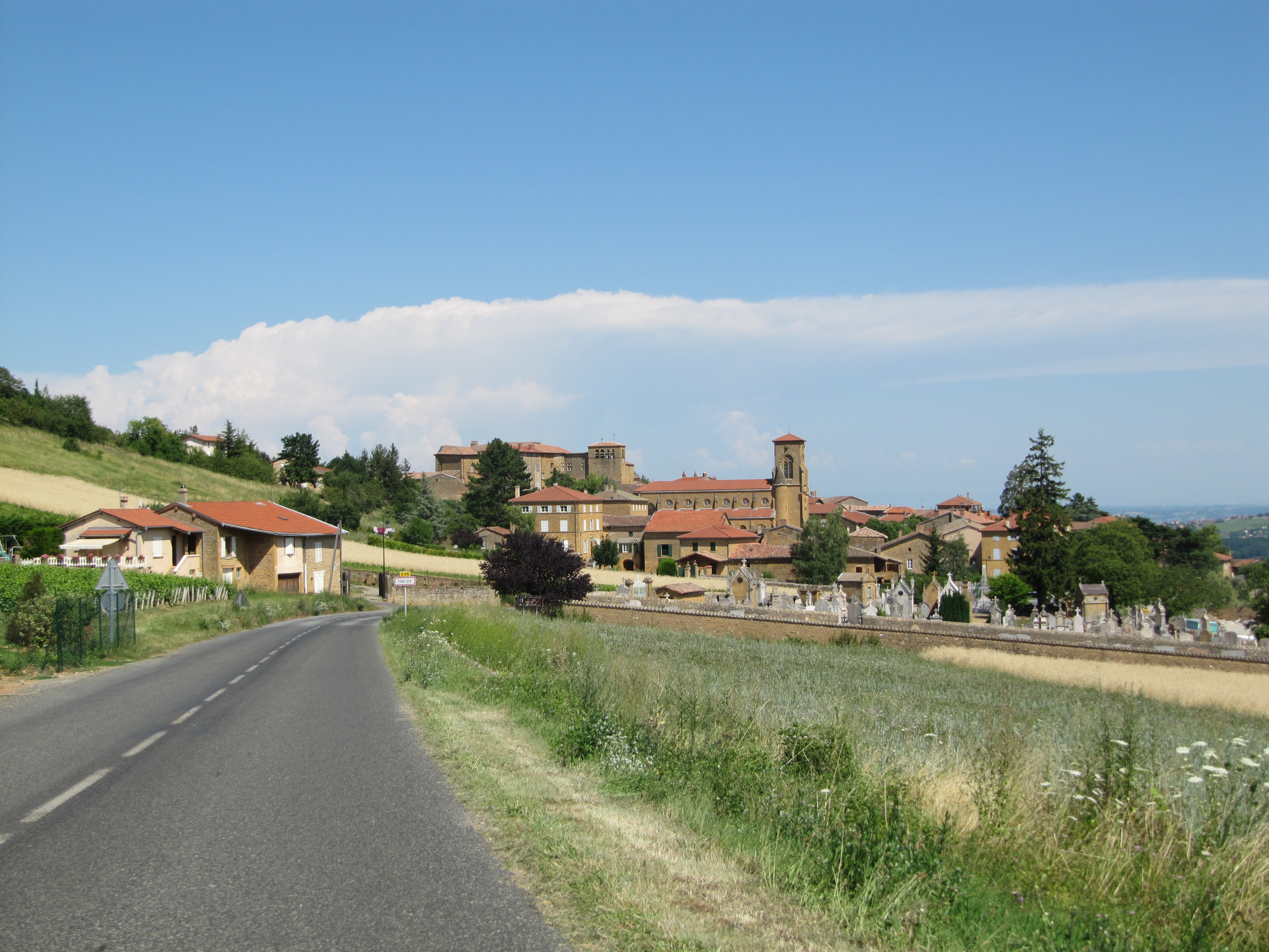 Theizé